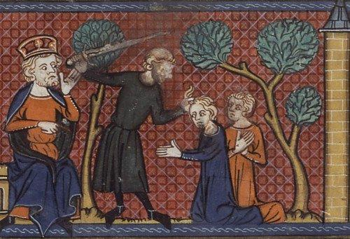 Martyre de saint Simplice et de saint Faustin. (Martyrdom of Saints Simplicius and Faustinus).